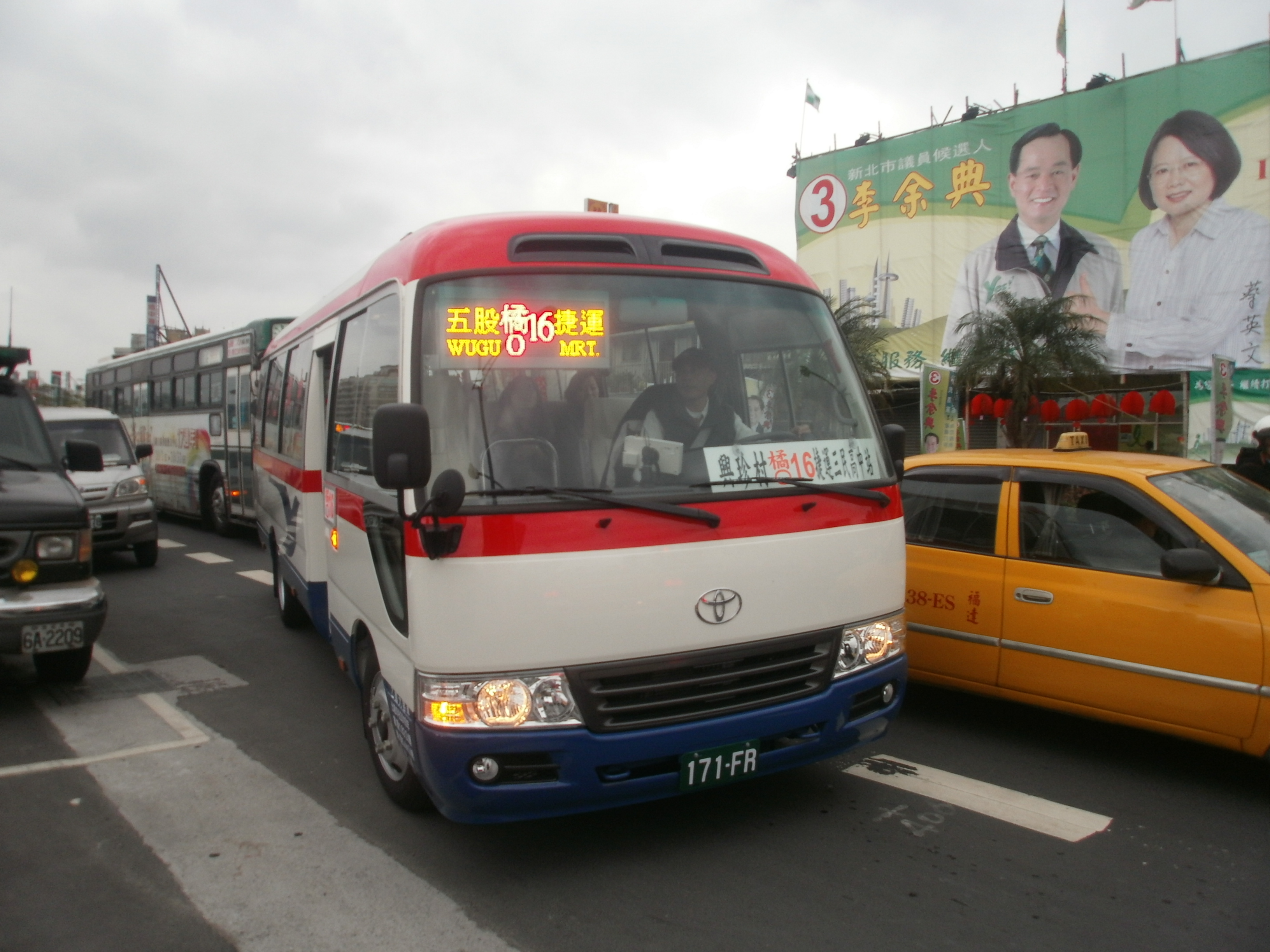 中興巴士 橘16路線公車